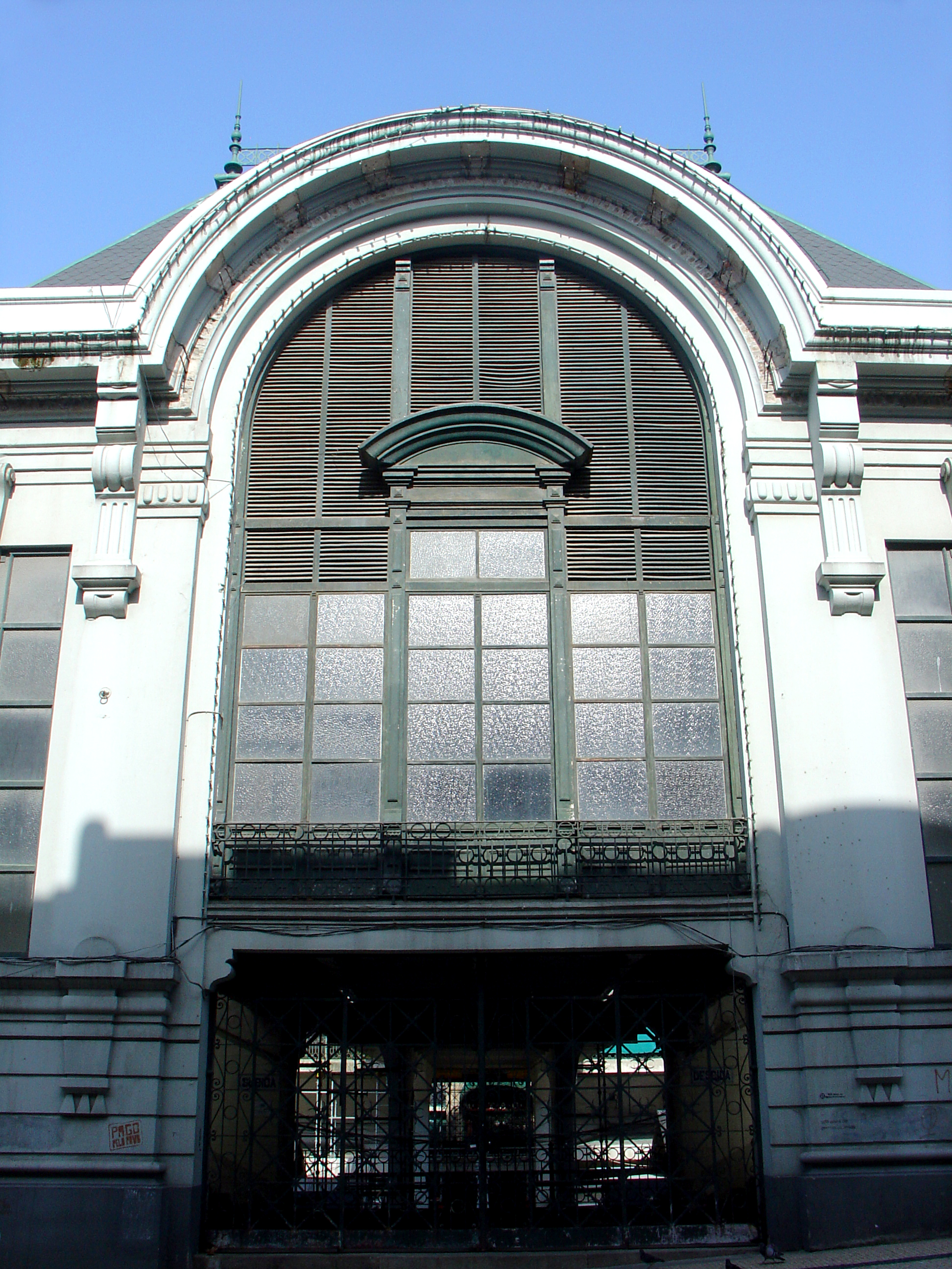 Bolhão Market entrance